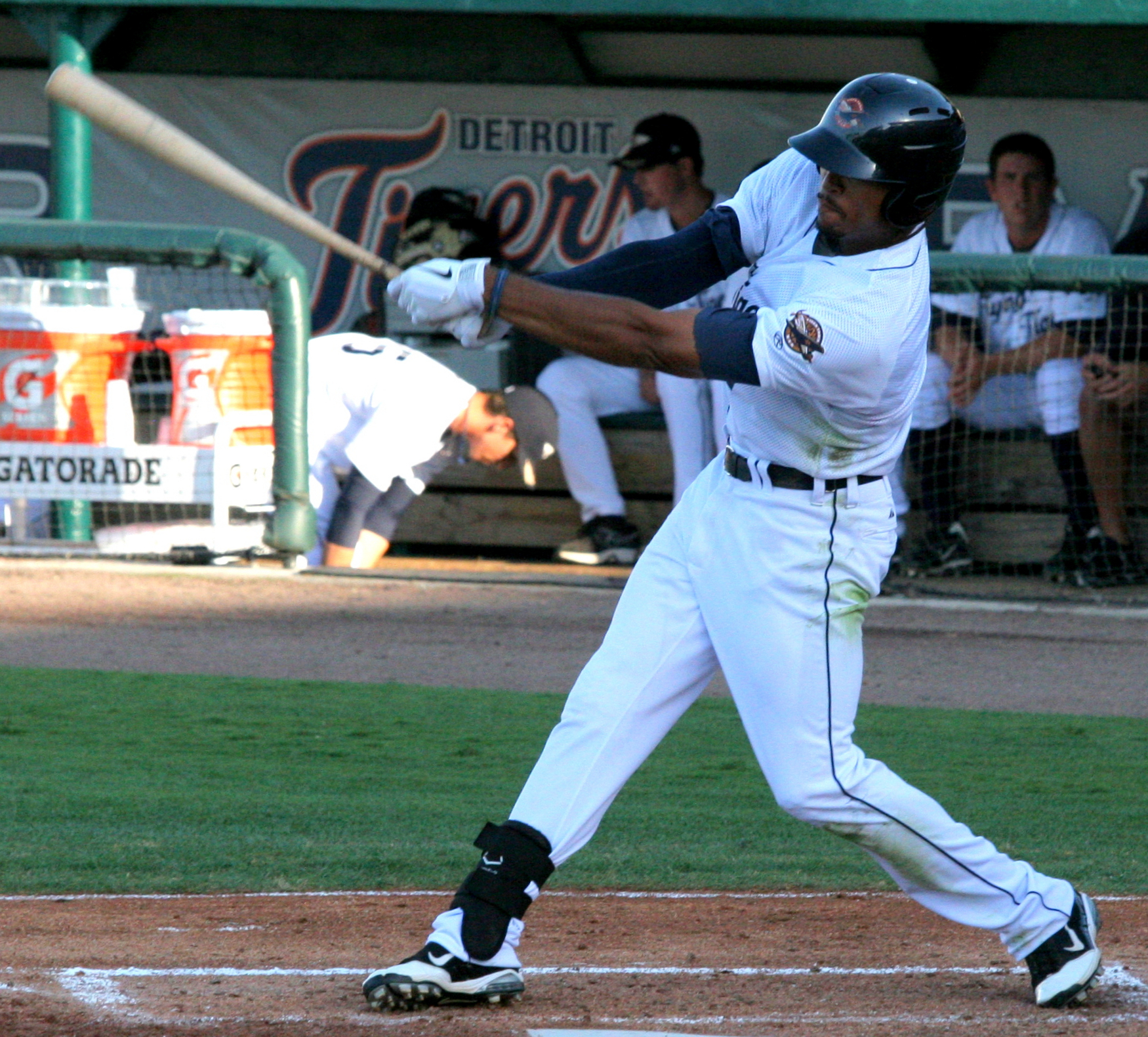 Daniel Fields